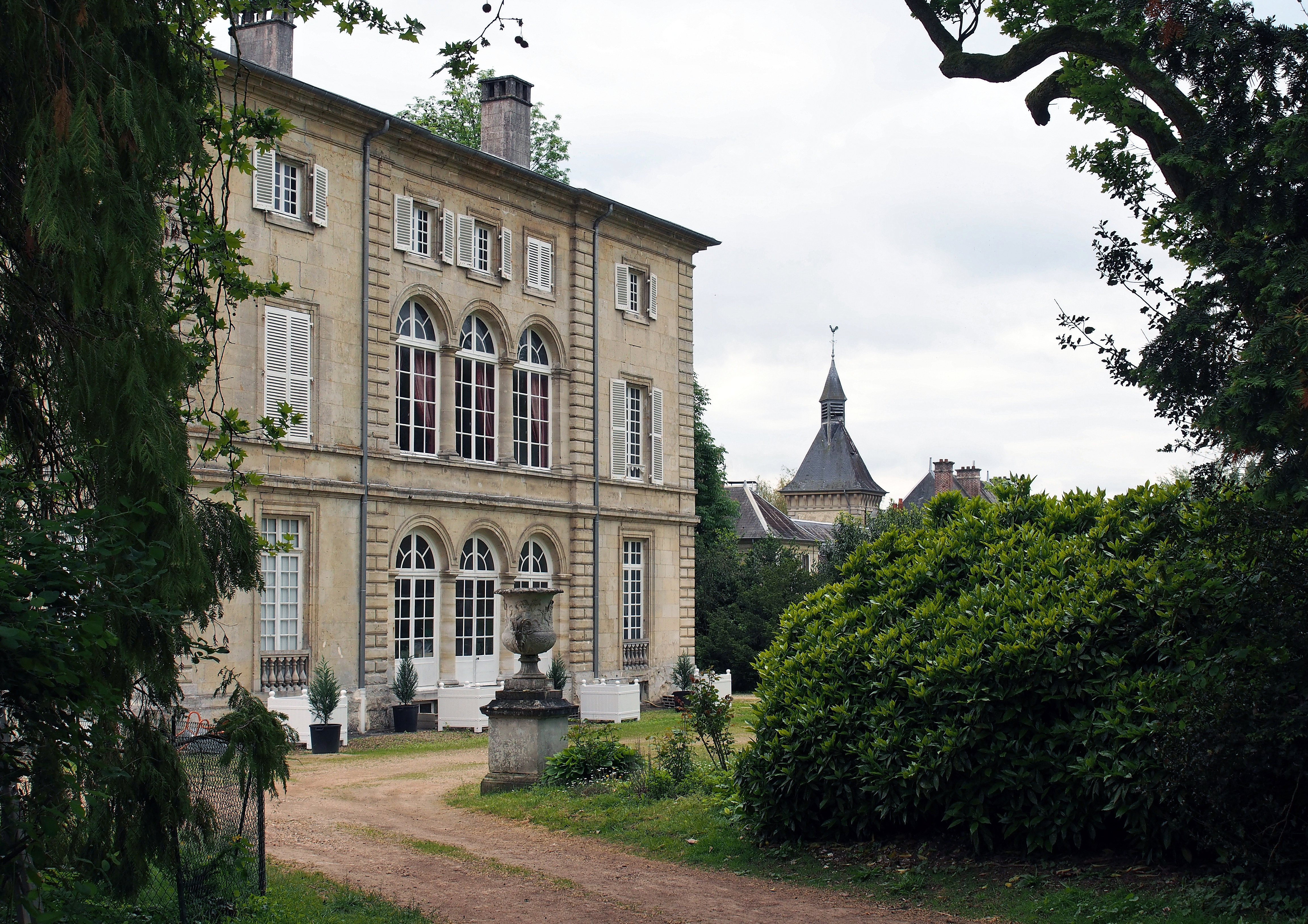 Château de Bourguignon-sous-Montbavin, (Inscrit, 7 juin 2004) .